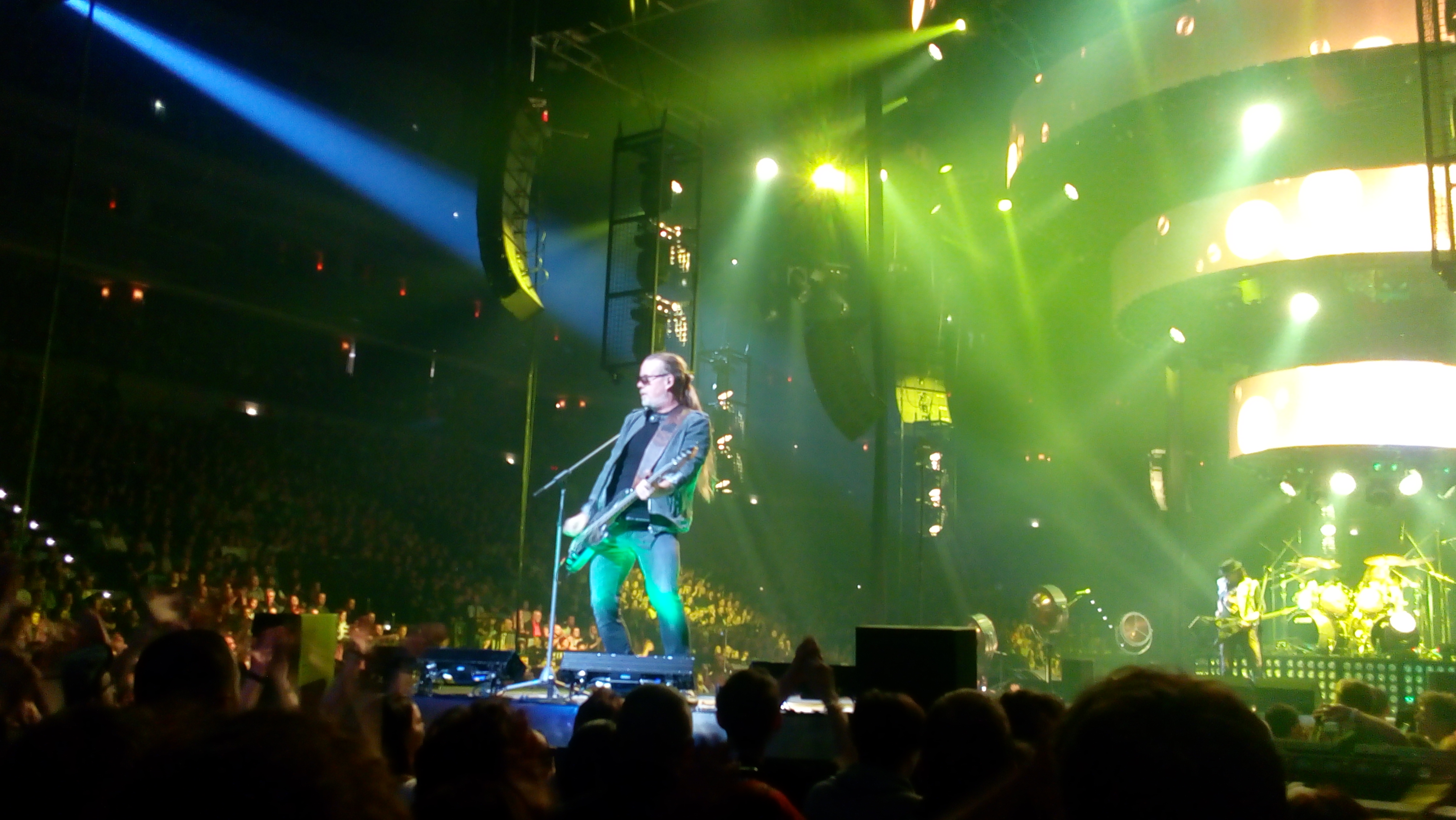 Skupina Kabát během vyprodaného koncertu v pražské O2 areně 28. 11. 2017